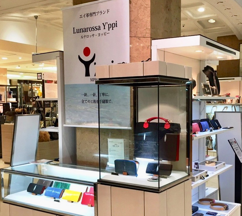 日本橋高島屋ポップアップ風景